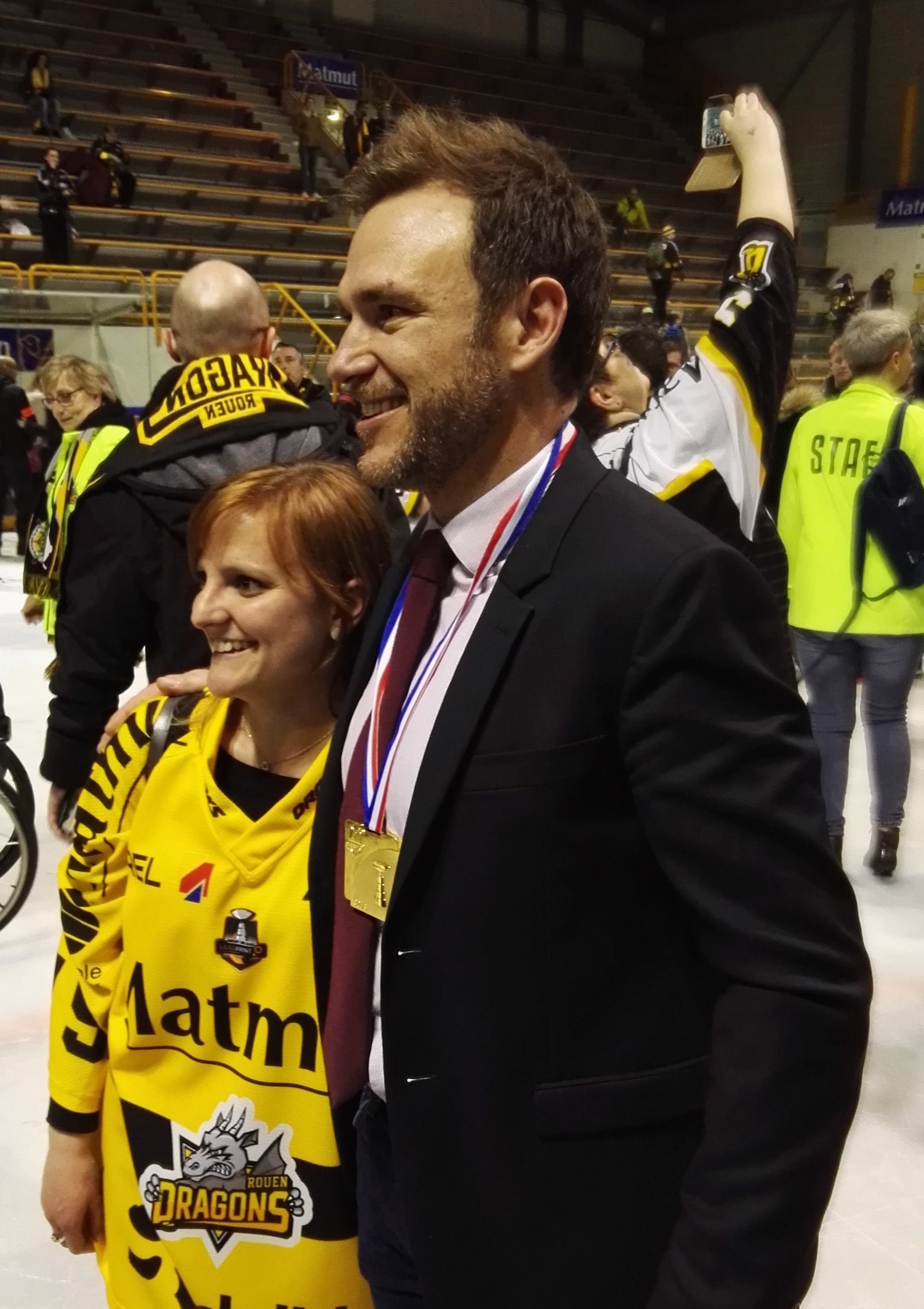 Fabrice Lhenry pose avec une supportrice Rouennaise lors de la victoire du championnat de France (saison 2017-2018)